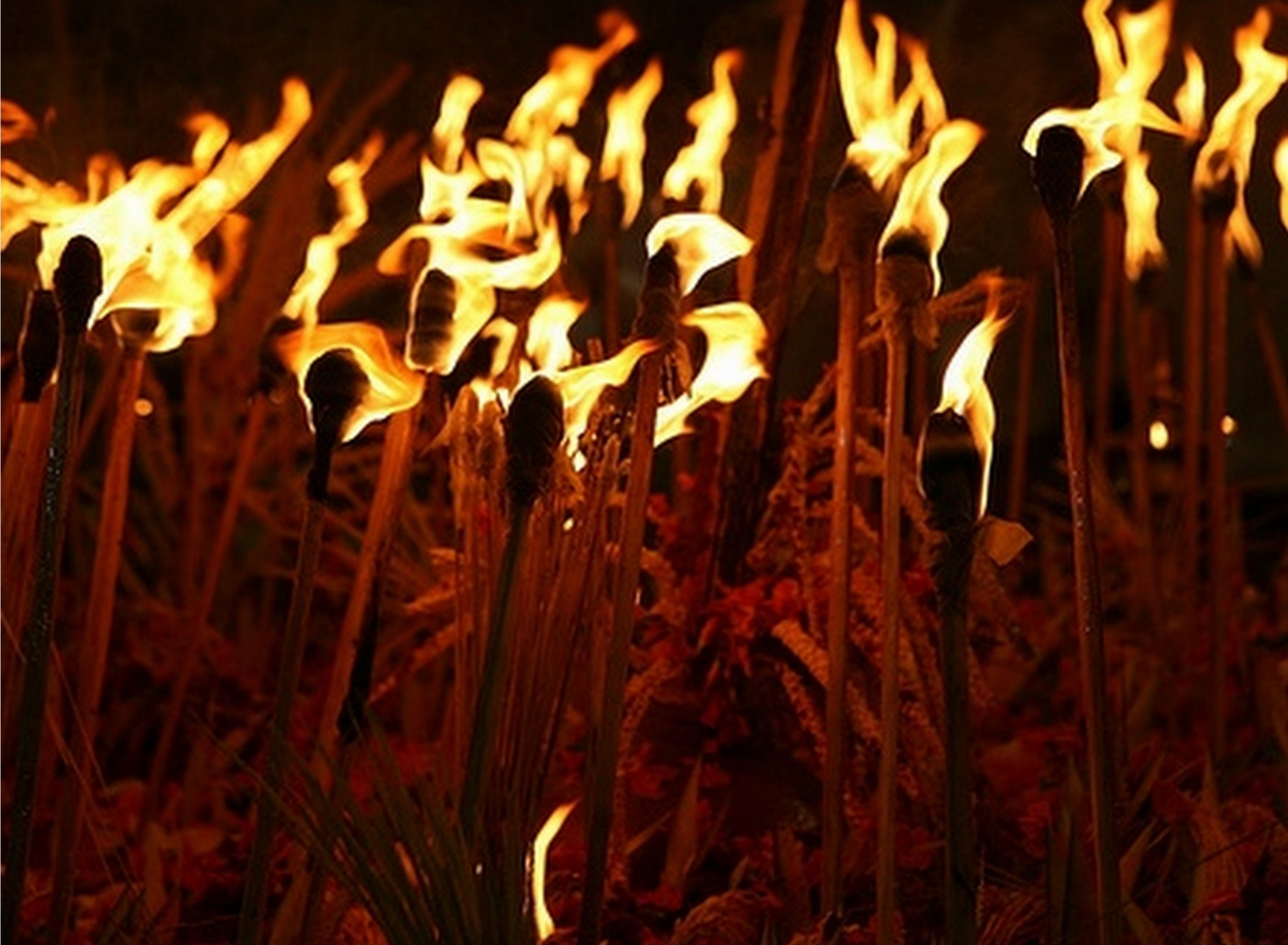 വലിയ ഗുരുതിയിലെ ആരതിക്കുശേഷം-വാഴപ്പള്ളിയിൽ മുടിയെടുപ്പിനാളിൽ രാത്രിയിൽ